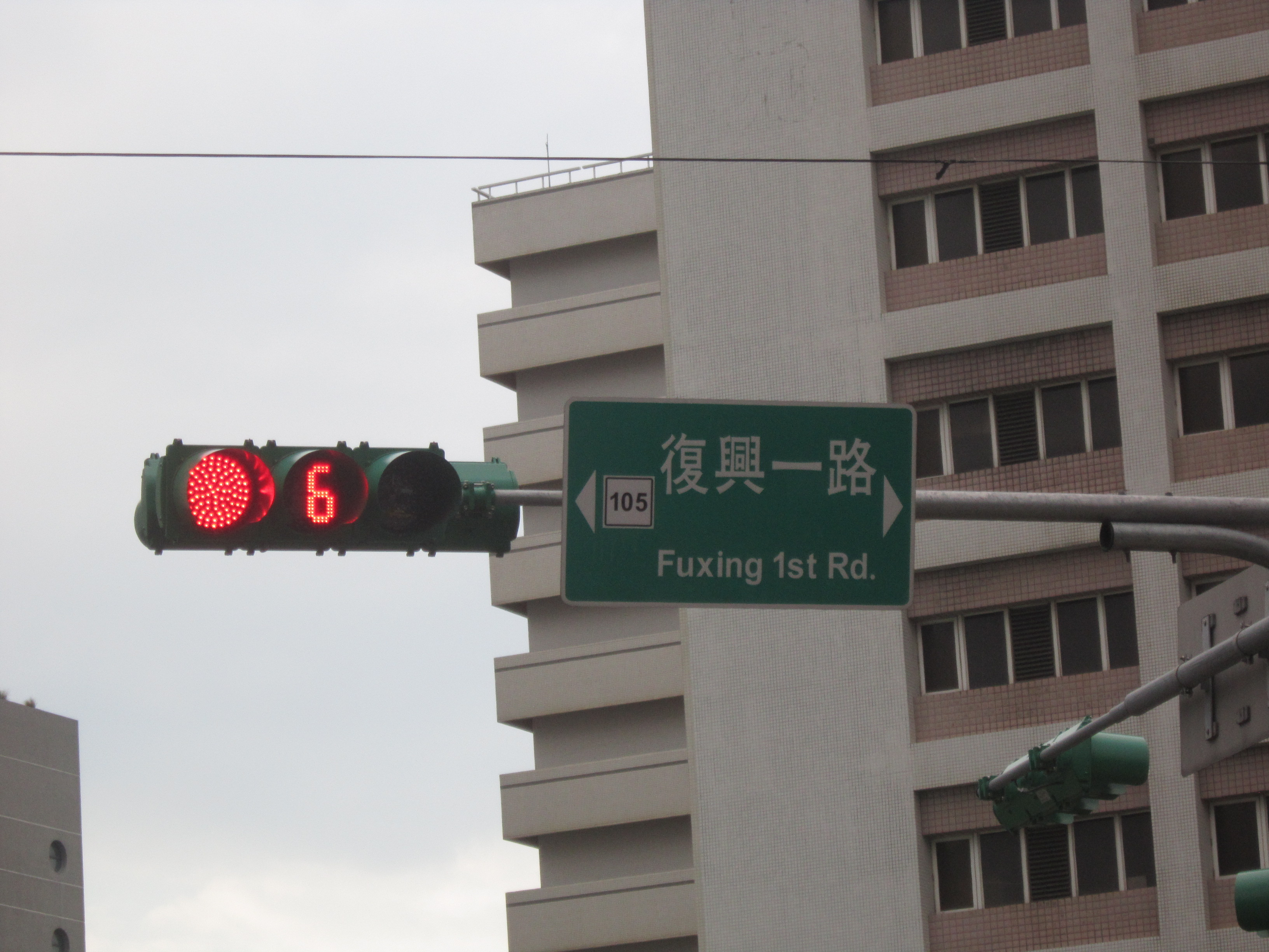 105號道(龜山區復興一路)